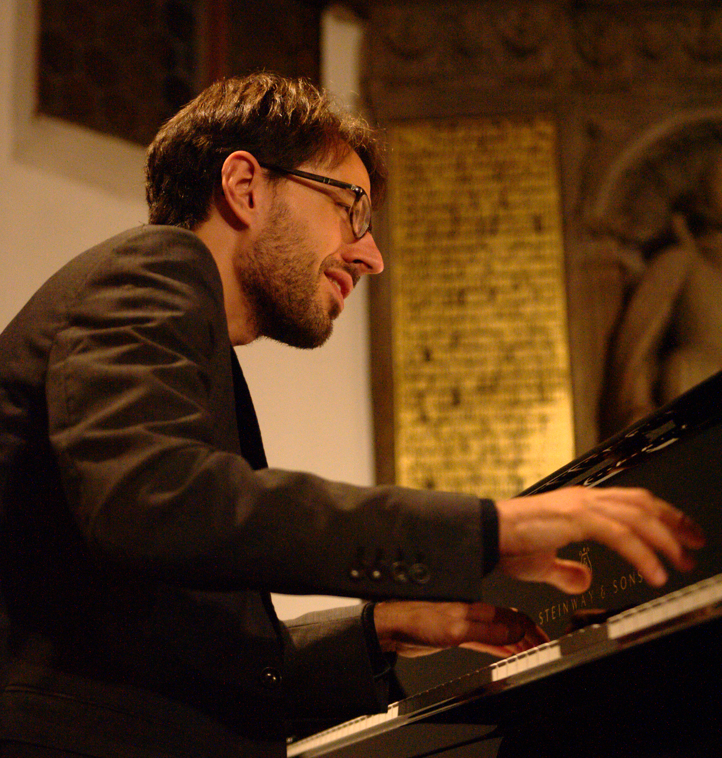 Sebastian Sternal beim Konzert mit dem Steffen Weber Quintett in der Stadtkirche Darmstadt am 25. September 2016